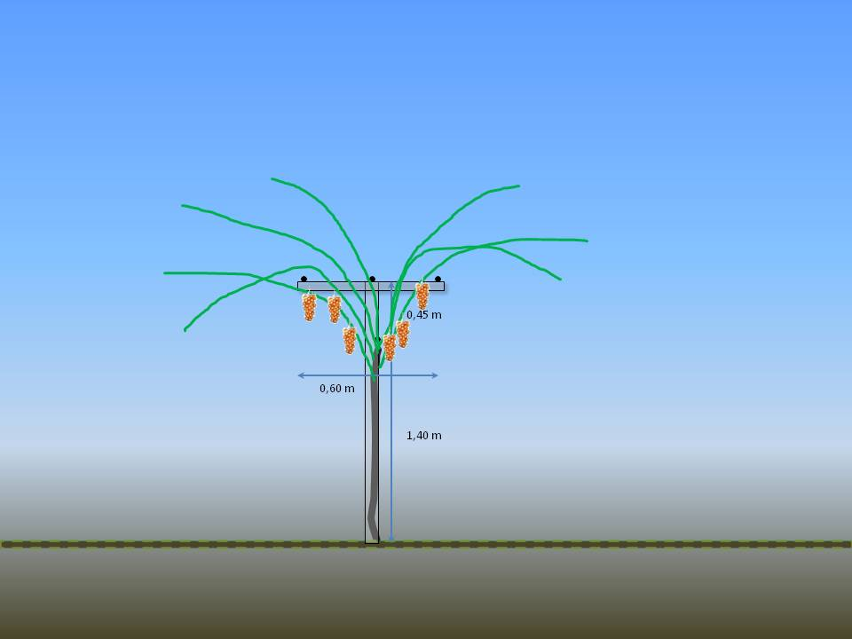 T Erziehung, Kordonerziehung, Triebverteilung